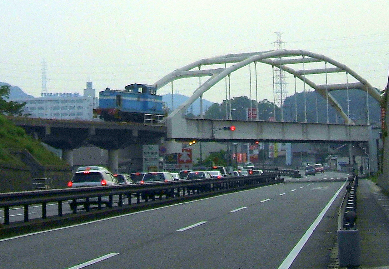 JFEスチール西日本製鉄所福山地区（日本国広島県福山市）に続く専用線を走行する機関車。車両を繋いでいないため錆び取り列車と思われる。なお鉄橋下の道路は国道2号線であり、背景に見えるのは英数学館高等学校の校舎である